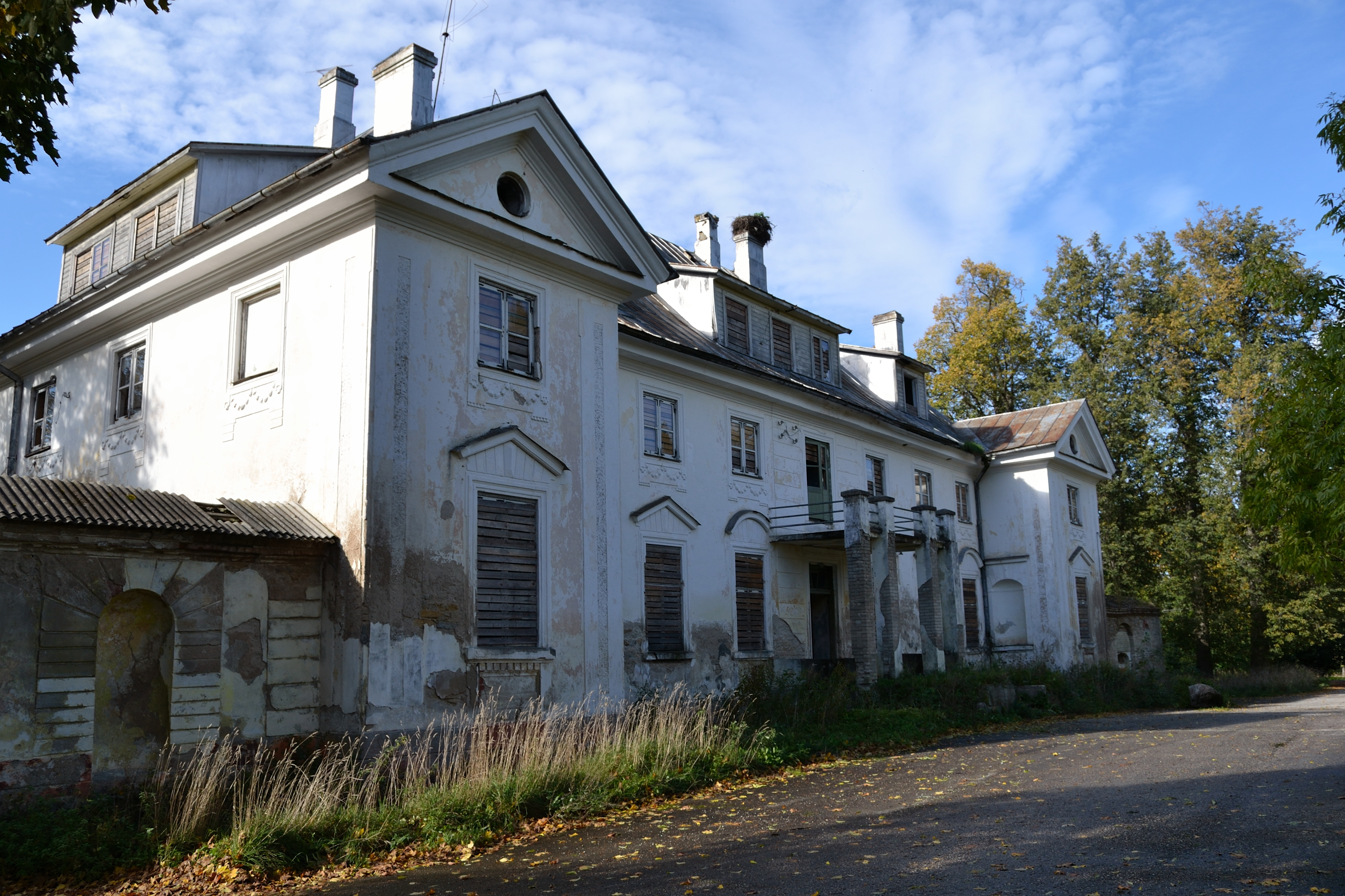 Purila mõisa peahoone